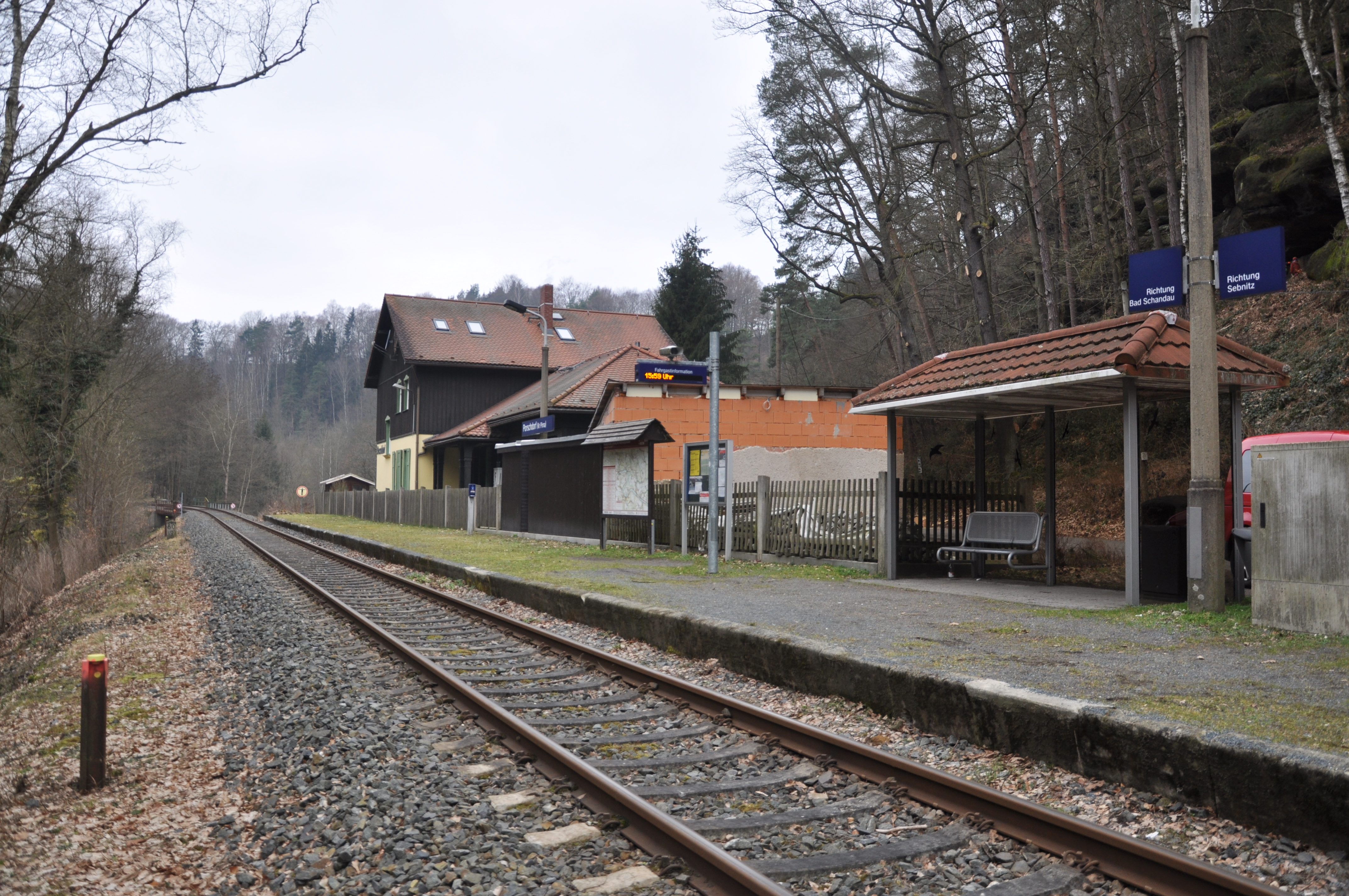 Haltepunkt Porschdorf, Sebnitztalbahn